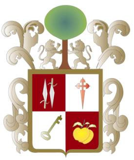 Escudo Ixtlahuacán de los membrillos